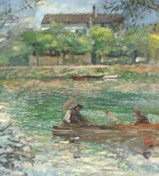 detail